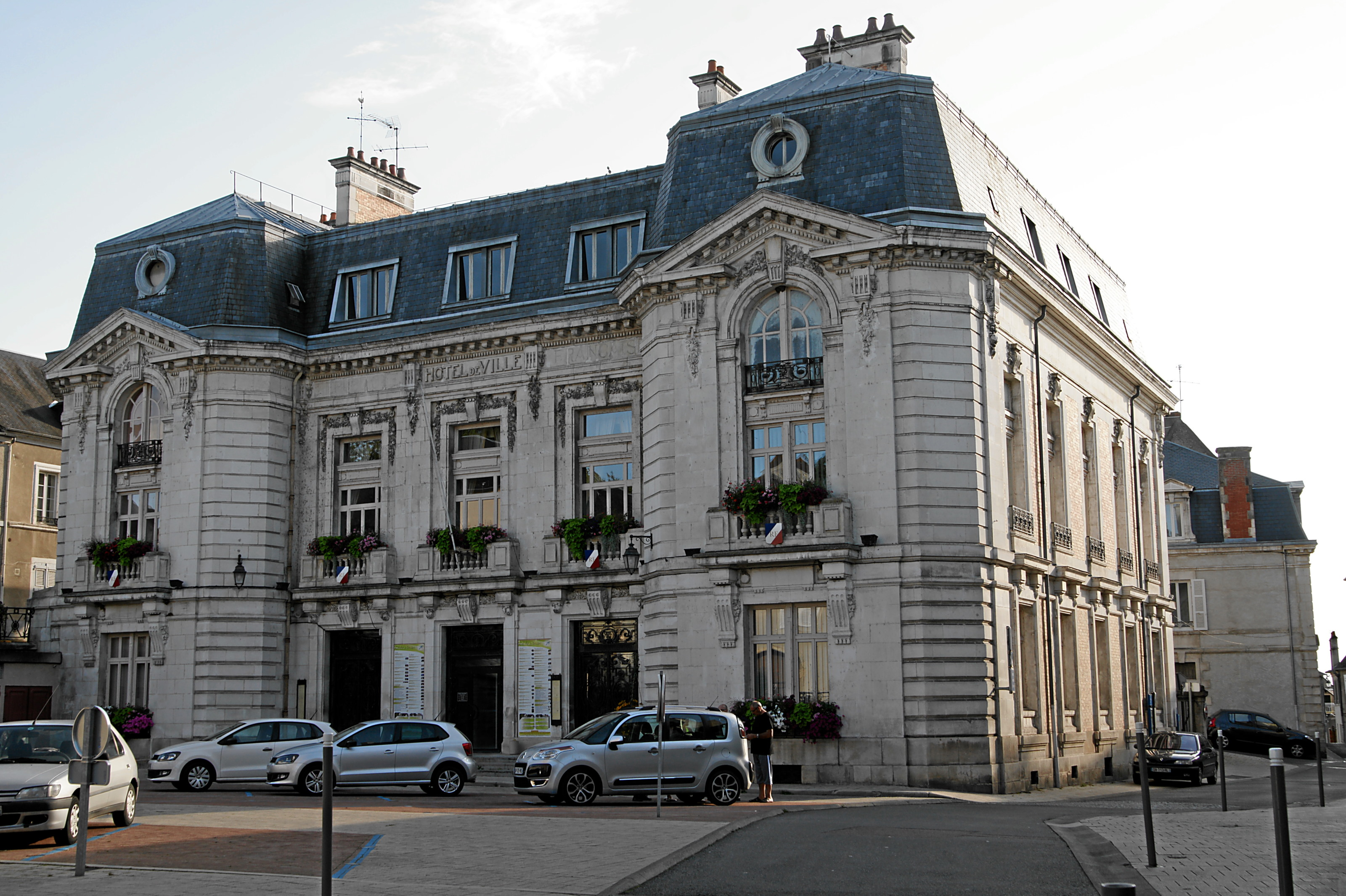 Decize: Rathaus ("Hôtel de Ville")